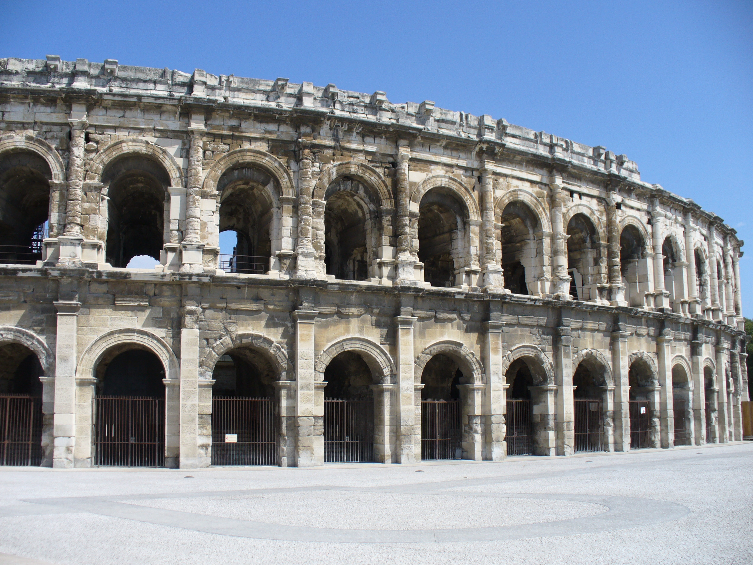 Nimes Römisches Amphitheater-Les Arenes